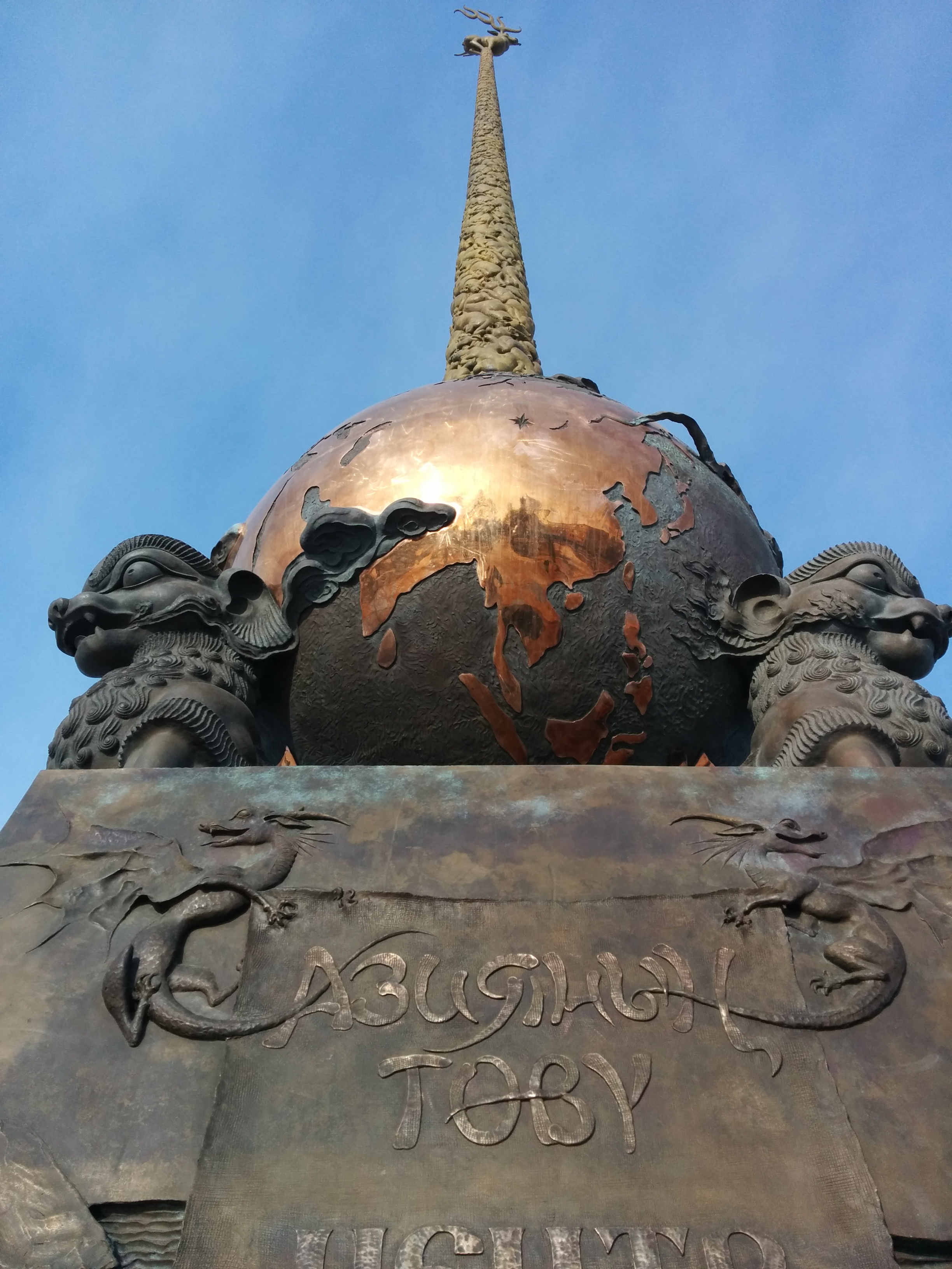 Тыва дыл: 2014 чылда чаарткан Азий Диптиң Төвүн демдеглээн демдек (обелиск). 2014 чылда "Кызыл хоорайның 100-чыл ою" дээш эрги турган обелискти солуп салган.